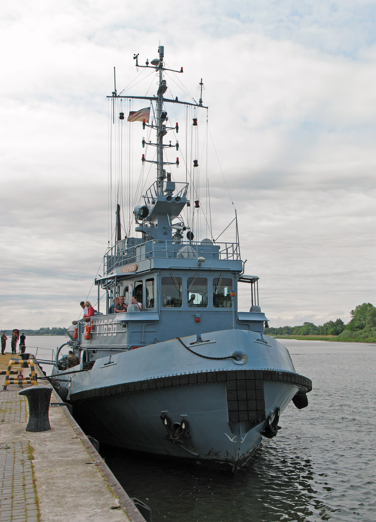 Dieses Bild zeigt den Bug des Schleppers Wustrow (Y1656) im Hafen der Marinetechnikschule Parow. Name: Wustrow / ex: Zander Schiffsklasse: Schlepper der Zander-Klasse Projekt 414 der ehemaligen Volksmarine Bauwerft: VEB Yachtwerft Berlin, Endausrüstung Volkswerft Stralsund Betreiber: 1985 - 1988 gemeinsam betrieben durch Volksmarine und Bagger-, Bugsier- und Bergungs-Reederei Oktober 1990 durch Bundesmarine übernommen und in Warnemünde stationiert Rufzeichen: DRTY Heimathafen: Flagge: Deutschland Deutschland / Rostock - Warnemünde / Hohe Düne Länge / Breite / Tiefgang: 30,60 m / 8,40 m / 2,50 m Geschwindigkeit: 12 kn Reichweite: 1.800 nm Verdrängung: 277 t Maschine: DM 6 VD 26/20 A-l-1, 530 KW (720 PS) Propeller: Verstellpropeller in Düse Pfahlzug: 11,5 t Besatzung: 8